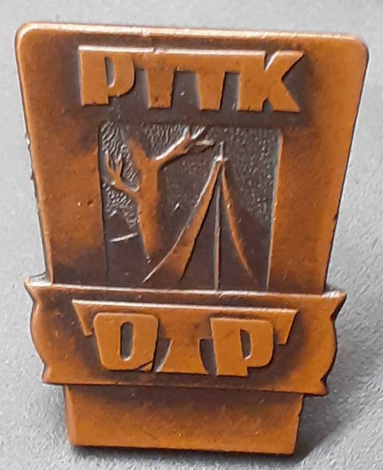 Mała Brązowa Odznaka Turystyki Pieszej (OTP) PTTK.